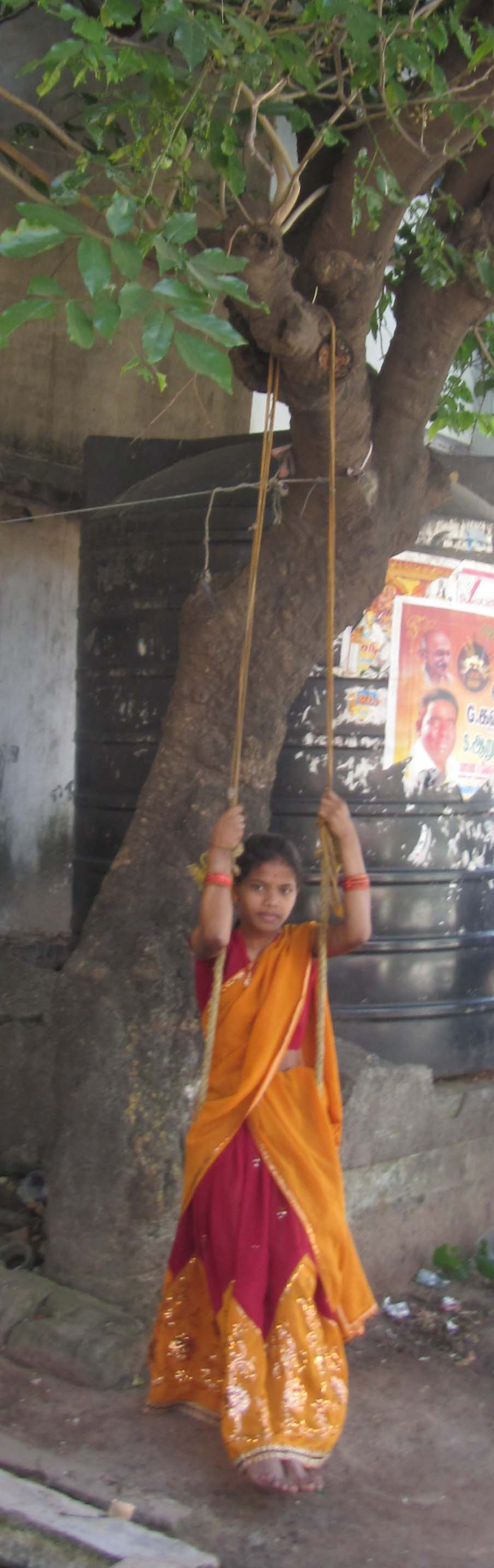 மரக்கிளைகளில் கட்டி ஆடும் கயிற்றூஞ்சல். own shot